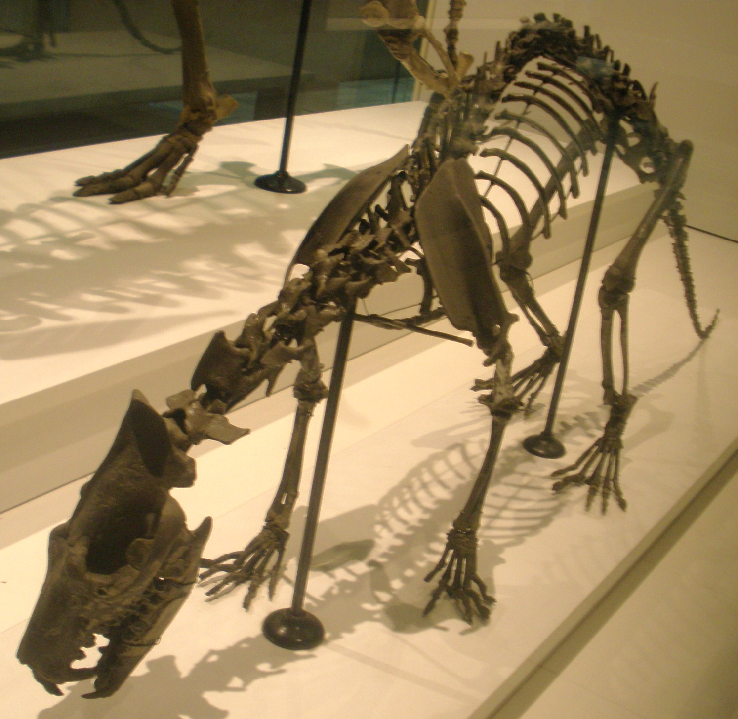 Fossil of Sinopa, an extinct creodont- Took the photo at Senckenberg Museum of Frankfurt